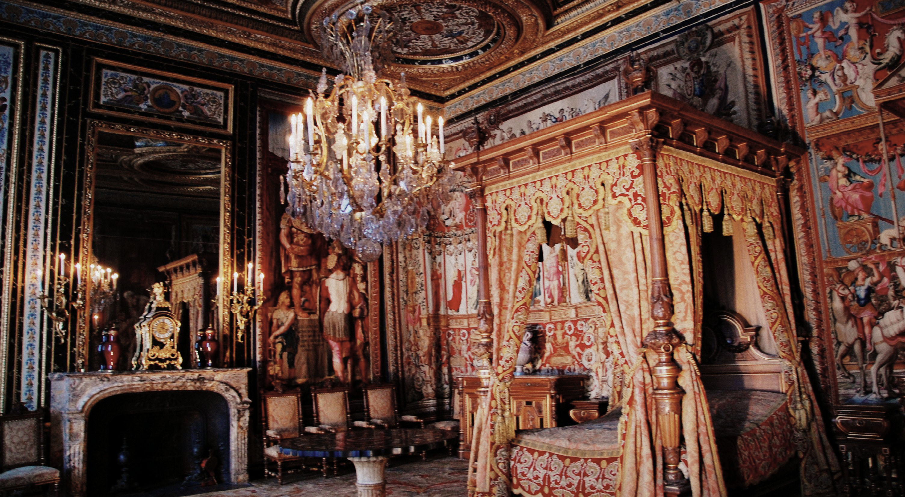 Schlafzimmer der Königinmutter im Schloss Fontainebleau